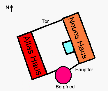 Grundriss der Alten Burg Neustadt-Glewe